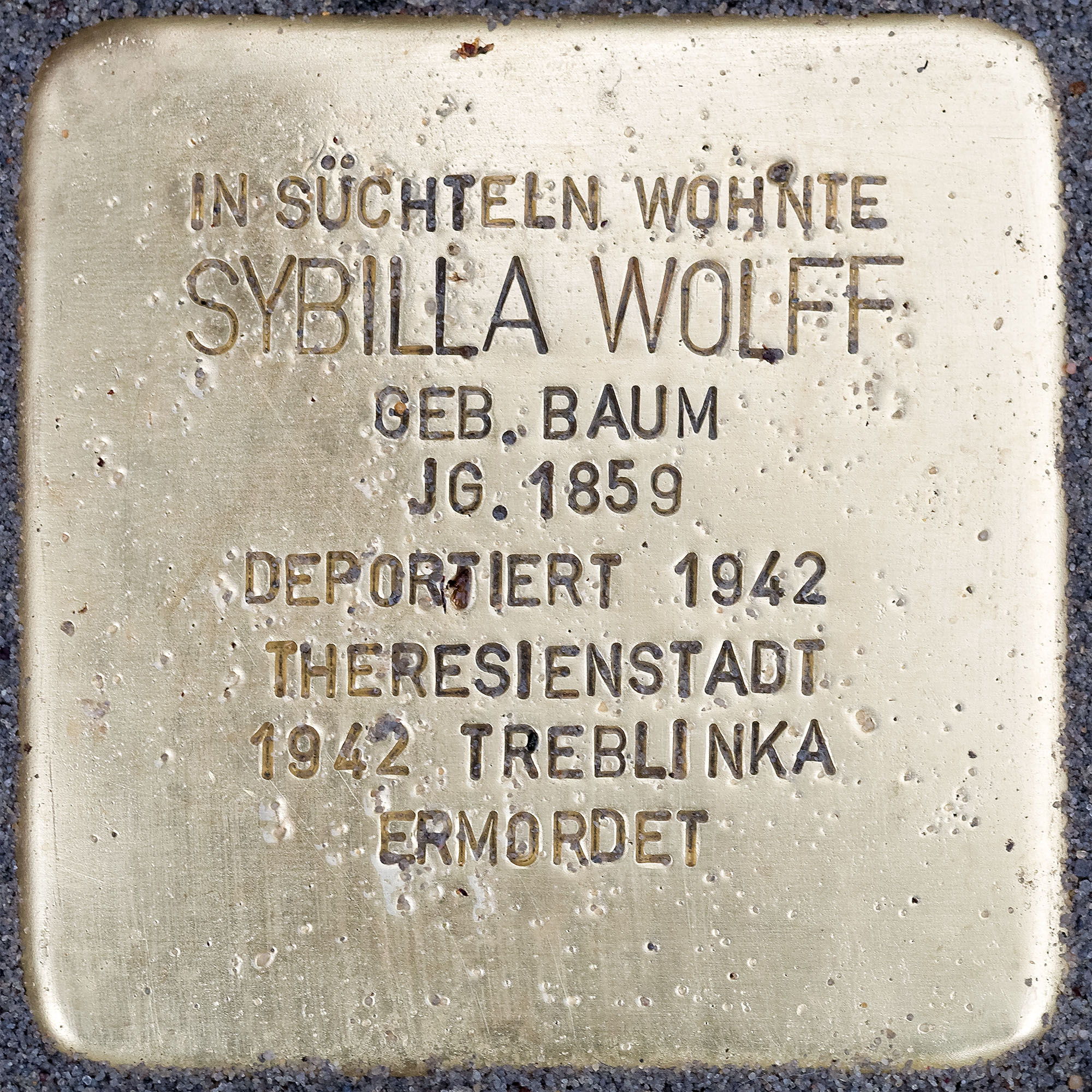 Stolpersteine Suechteln: Wolff, Sybilla